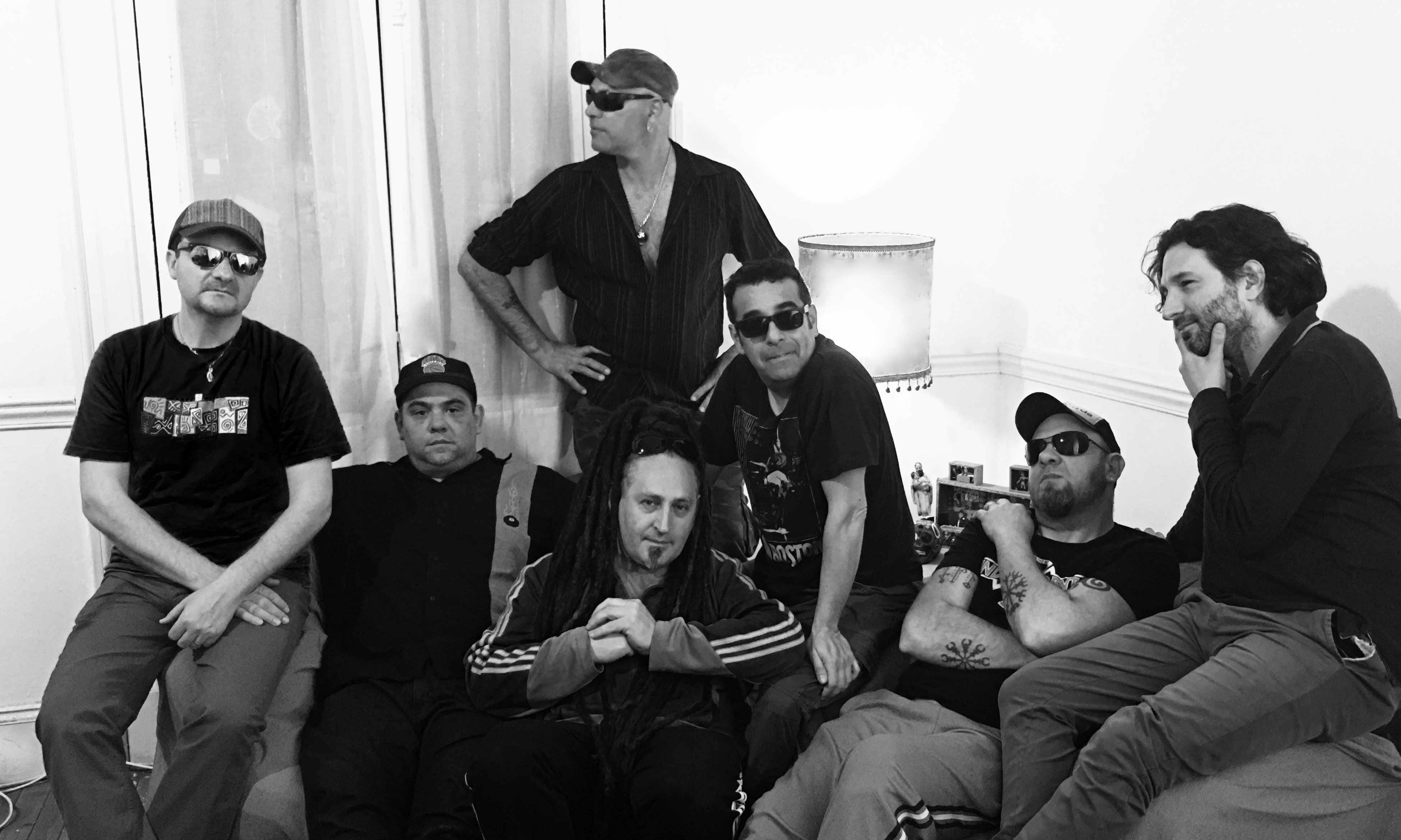 Banda de rock Karamelo Santo año 2016